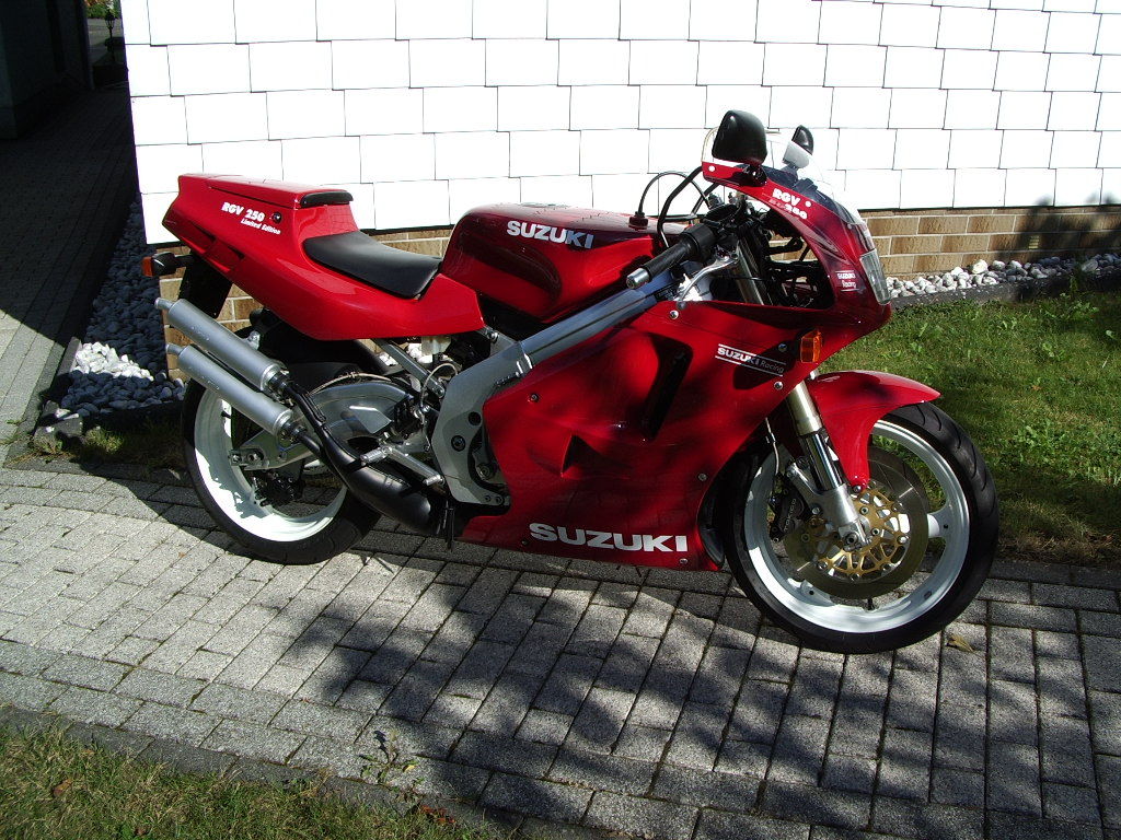 Suzuki RGV 250 N, Sonderlackierung